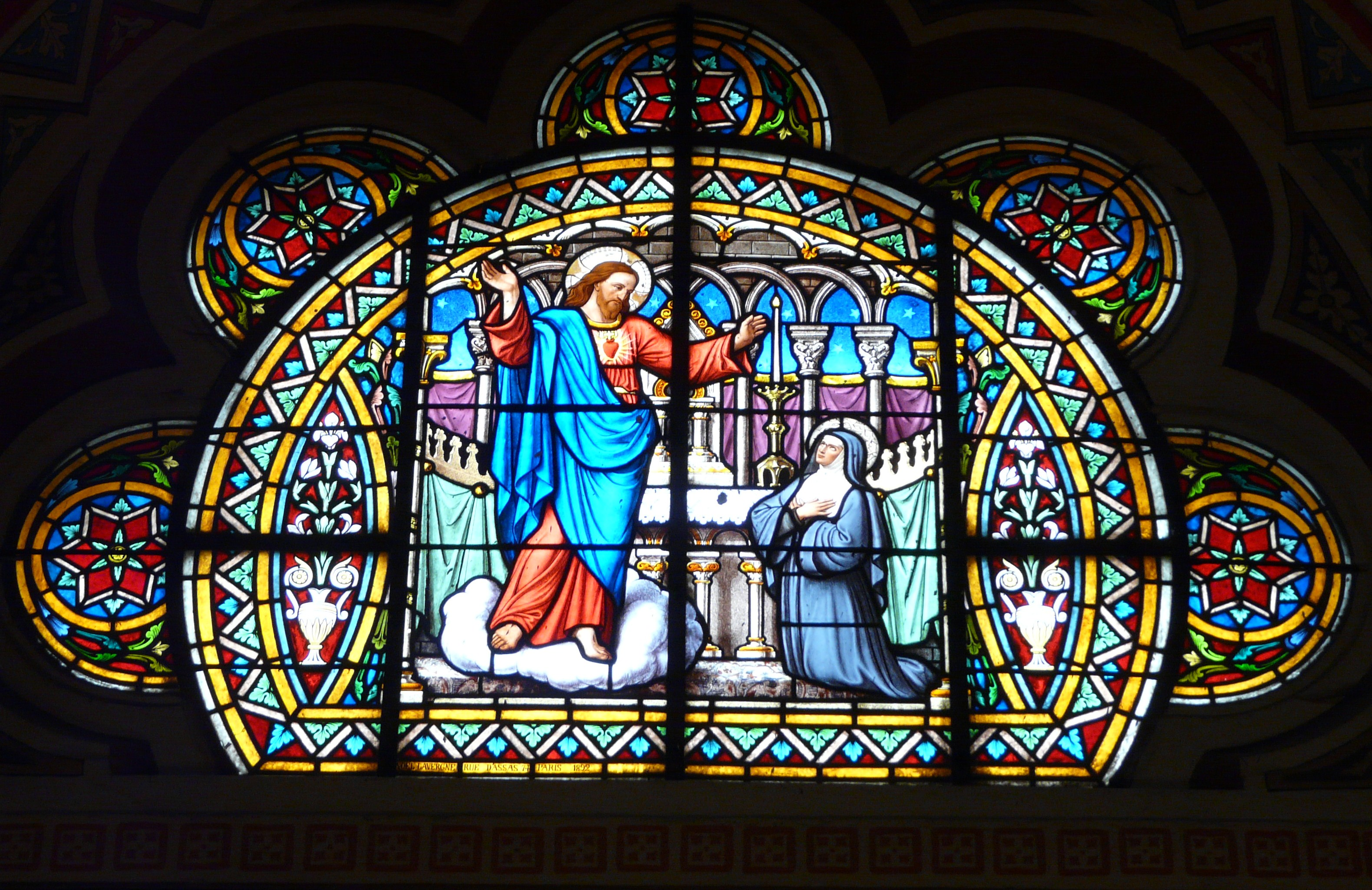 Le vitrail de la chapelle du Sacré-Cœur de Jésus, église Notre-Dame de l'Assomption, Bagnères-de-Luchon, Haute-Garonne, France.